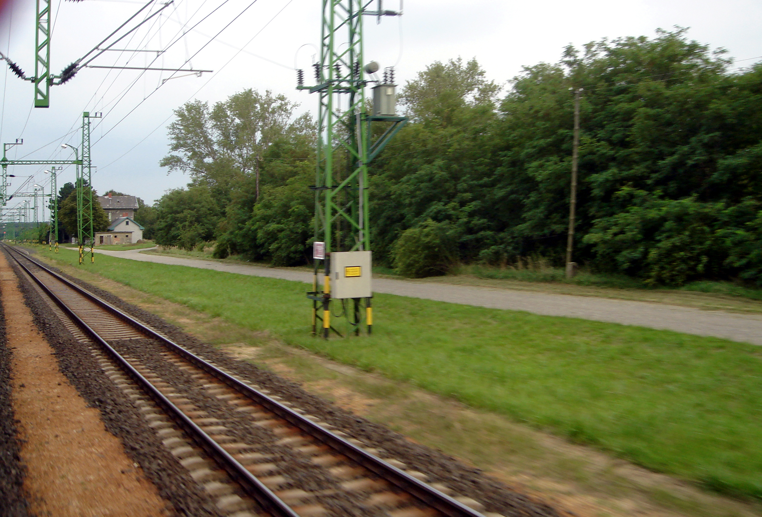 Bahnhof Harka, Ungarn, auf der Fahrt nach Deutschkreutz, Österreich (13. August 2010)